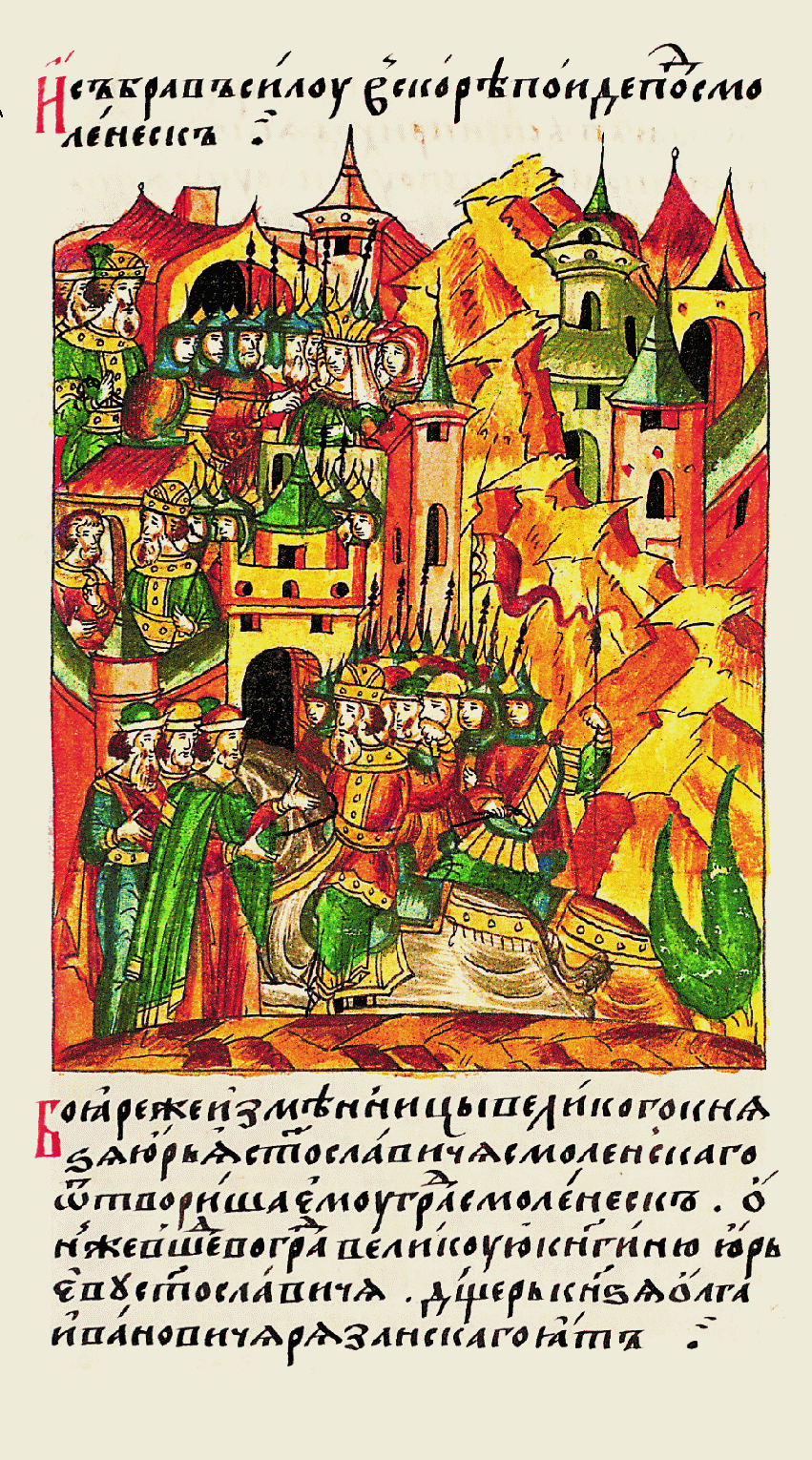 Бояре — измен- ники великого князя Юрия Святославича Смолен- ского отворили Ви- товту город Смоленск. Он же, войдя в город, великую княгиню, жену князя Юрия Свя- тославича, дочь Олега Ивановича Рязанского, взял в плен.